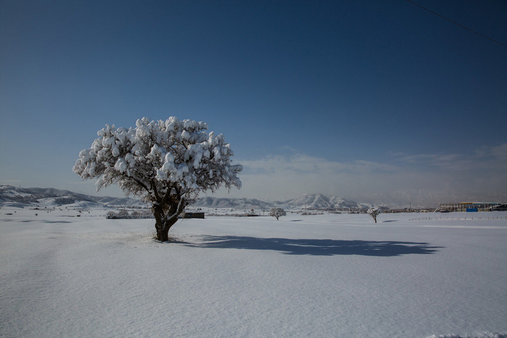 مناطق سردسیر و دیدنی کردستان به دلیل جریان زندگی سنتی و اصیل همواره از جاذبه‌های گردشگری این استان بوده و مردم در این مناطق به خوبی با شیوه زندگی در نقاط بکر و دست‌نخورده آشنا هستند. بلکر یکی از روستاهای زیبا در ۸۵ کیلومتری مریوان است، مردم این روستا به شیوه سنتی لباس می‌پوشند و به مشاغل سنتی نیز مشغول هستند. زنان و مردان در کنار یکدیگر به دامداری اشتغال دارند و وظیفه تربیت و نگهداری از فرزندان نیز بر عهده زنان روستا است. بارش برف در برخی ماه‌های سال به اندازه‌ای است که رفت و آمد و زندگی روزمره را دچار مشکل می‌کند، مردان روستا از صبح به پشت‌بام‌ها و خیابان‌ها می‌روند و به کمک پاروی چوبی برف‌روبی می‌کنند تا مردم و کودکان بتوانند در روستا تردد کنند. خانواده‌هایی که زمستان را در روستای بلکر سپری می‌کنند، به یکدیگر کمک می‌کنند تا با عشق و امید به کمبود امکانات و سرمای زمستان غلبه کنند.